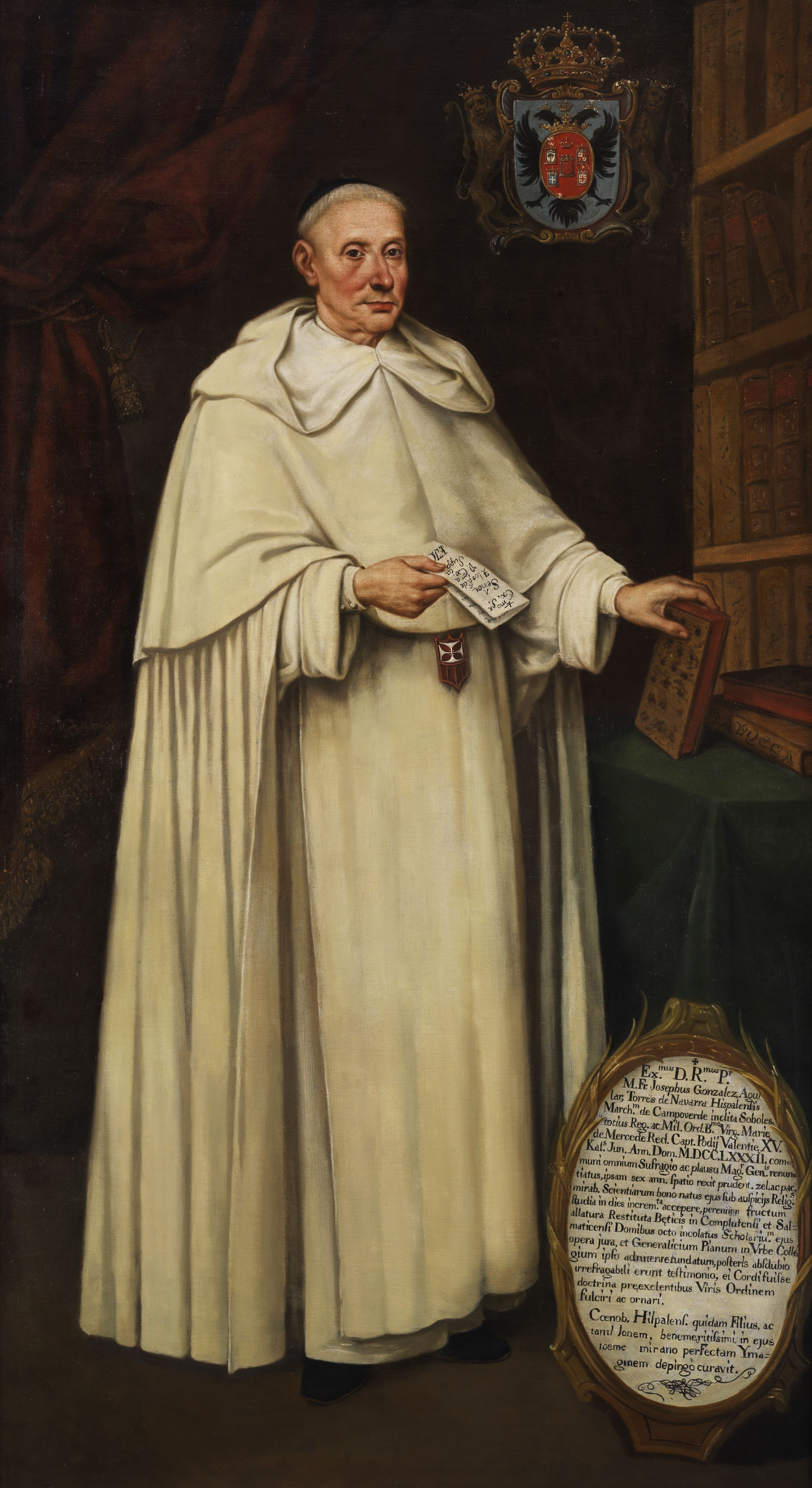 Portrait des Josephus Gonzalez (José Gonzalez, Generalmagister des Mercedarierordens)